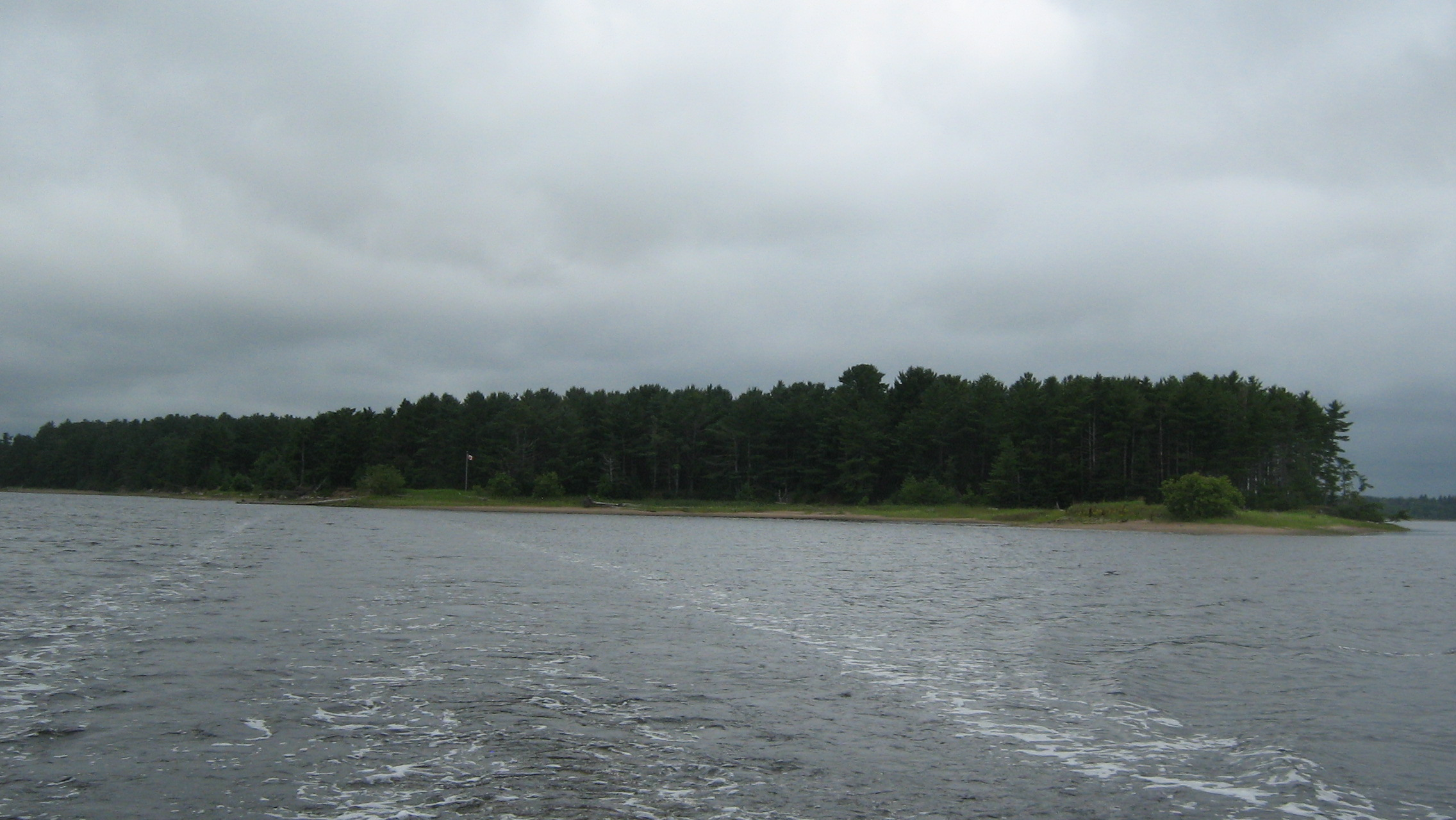 Île Boishébert vue de la rivière Miramichi